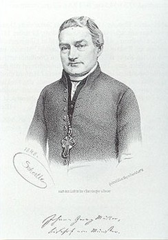 Johann Georg Müller, Bischof von Münster 1847-1870, als Abgeordneter der Frankfurter Nationalversammlung 1848